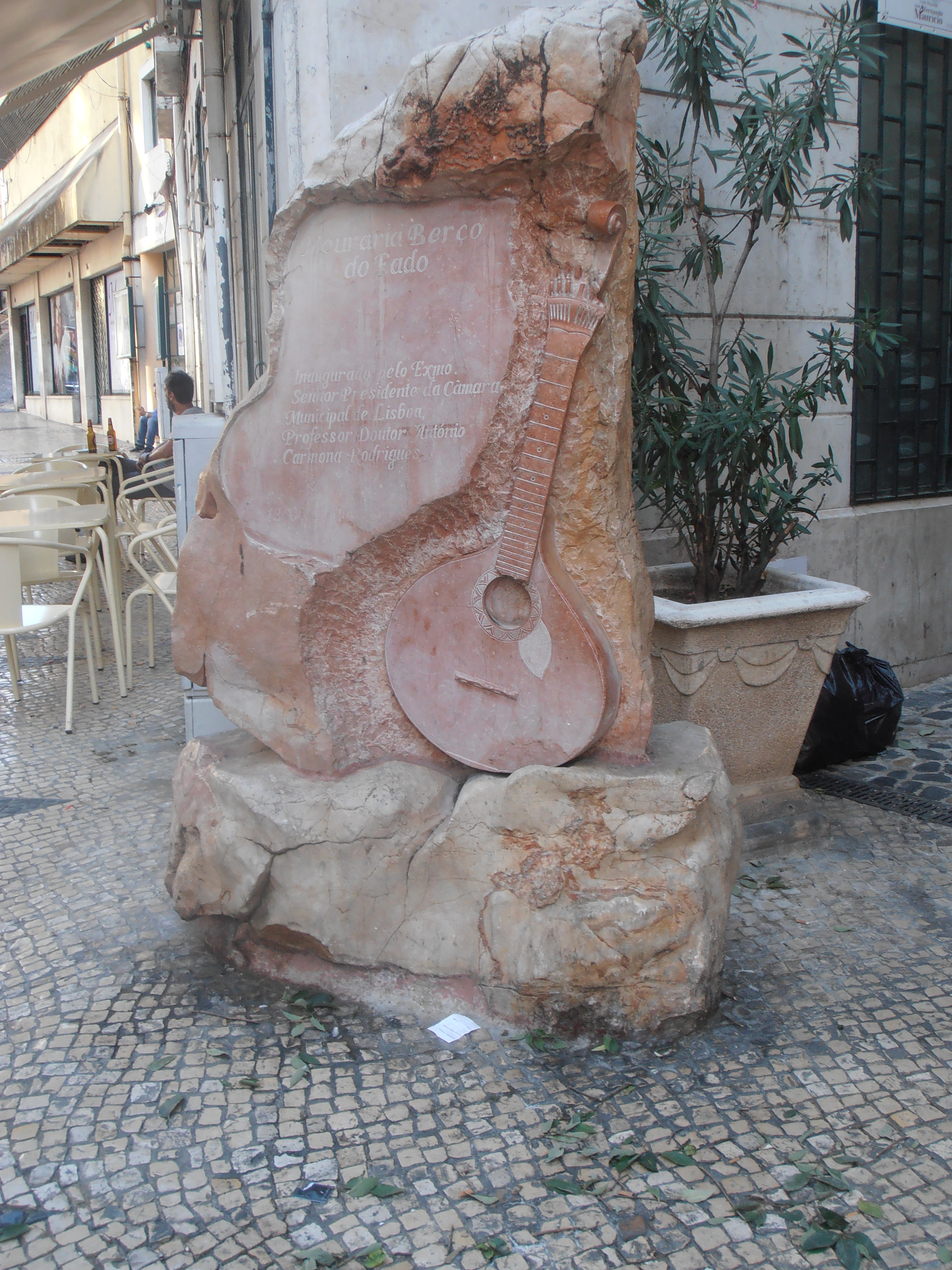 Lisbonne (Portugal). Lisbonne du Fado, patrimoine culturel immatériel de l'humanité depuis novembre 2011. Forme d'expression musicale. Une vue durant le parcours à pied avec la compagnie musicale d'un fadista qui chante dans les ruelles les plus importantes liées au Fado. Le circuit se termine dans une Casa de Fado traditionnel, où l'on assiste à une soirée de Fados, tout en dégustant une soupe au choux verts et un saucisson grillé.